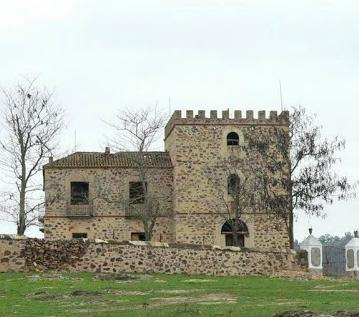 Paraje del Monasterio de Loriana (Mérida)